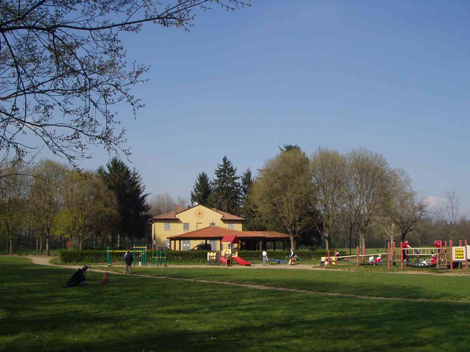 MB Monza Parco della Villa Reale - cascina Isolina